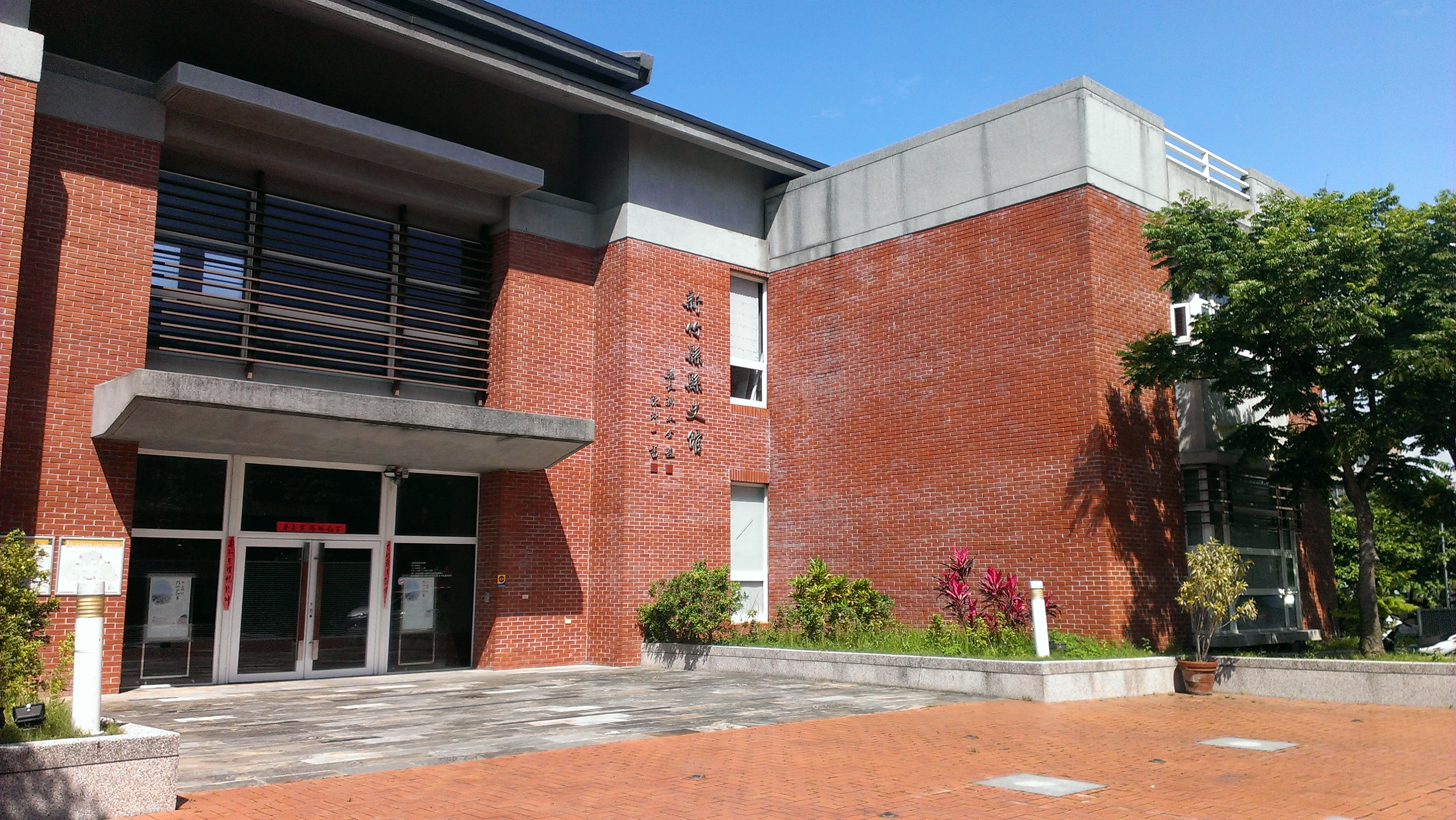 新竹縣政府文化局縣史館